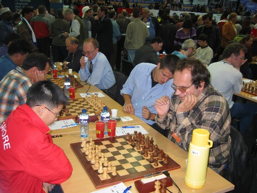 Olimpiada 2002 Bled. Prva moška ekipa Slovenije - Slovenija A - pred dvobojem s Singapurjem, ki so ga dobili 3 : 1. Z leve proti desni A. Beliavsky, A. Mikhalchishin, D. Pavasovič, G. Mohr.